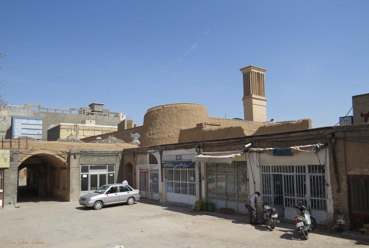 کاروانسرای امین التجار کاشمر